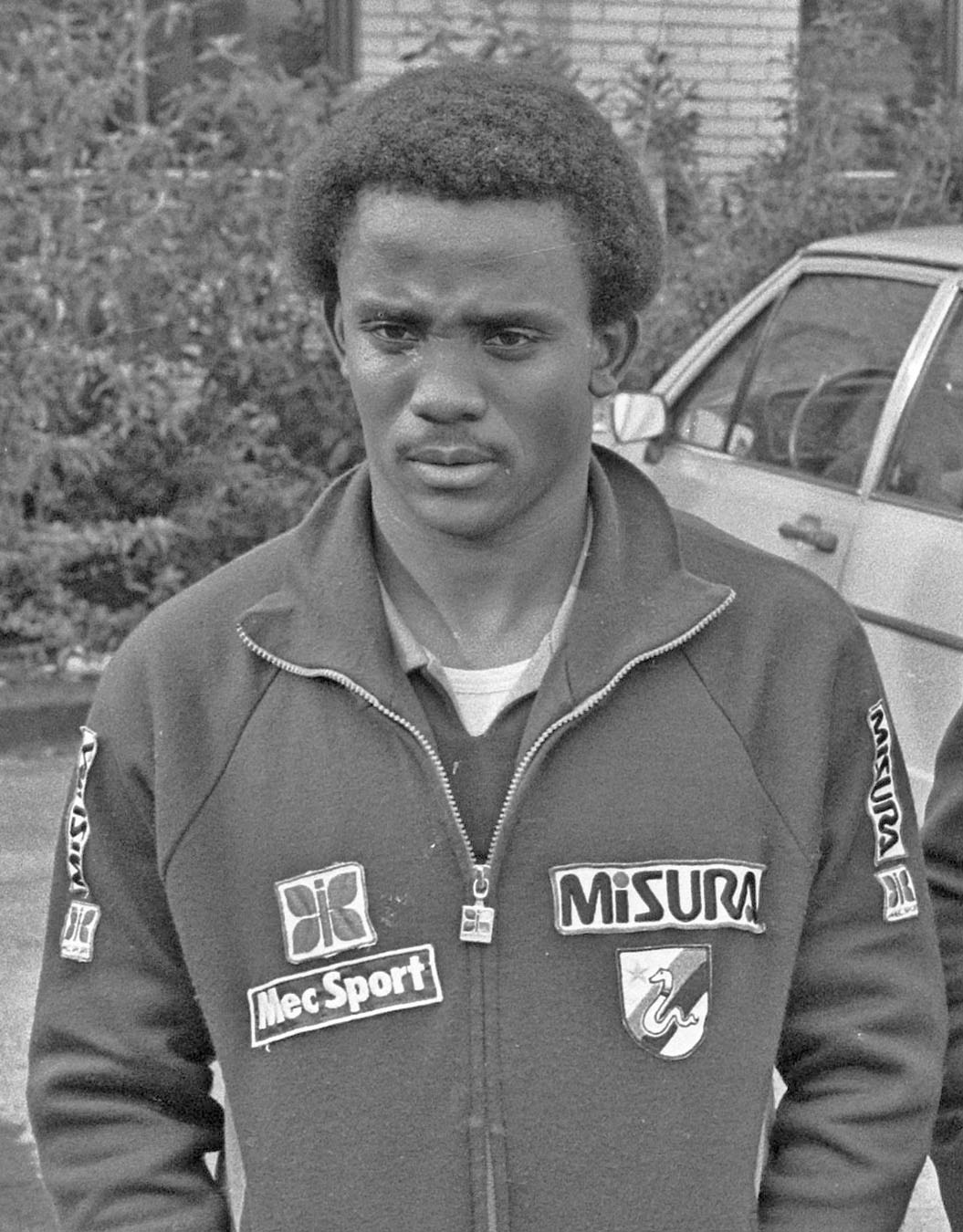 Heilo, Noord-Holland. Inter Milaan in Motel Heilo. Juary Jorge dos Santos Filho.